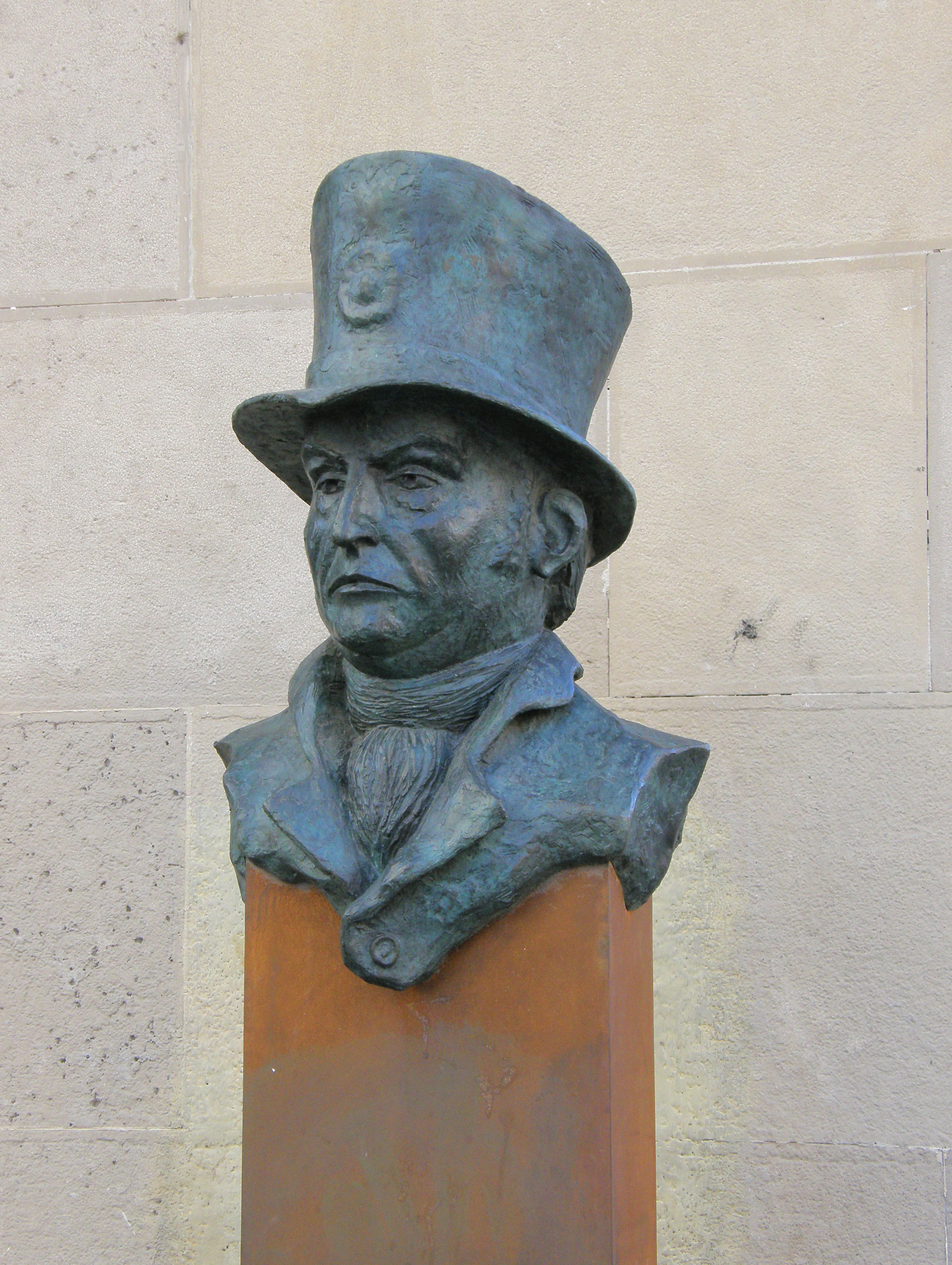 Busto del héroe de los Sitios de Zaragoza Felipe Sanclemente y Romeu, obra del escultor Jesús Gazol, situado en el Paseo de la Independencia de Zaragoza.